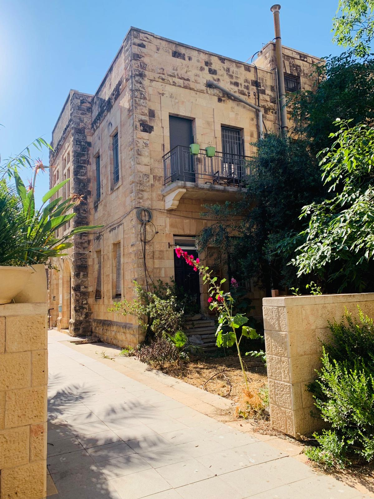 بيوت من حيّ الطالبية